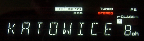 RDS Program service - Polskie Radio Katowice